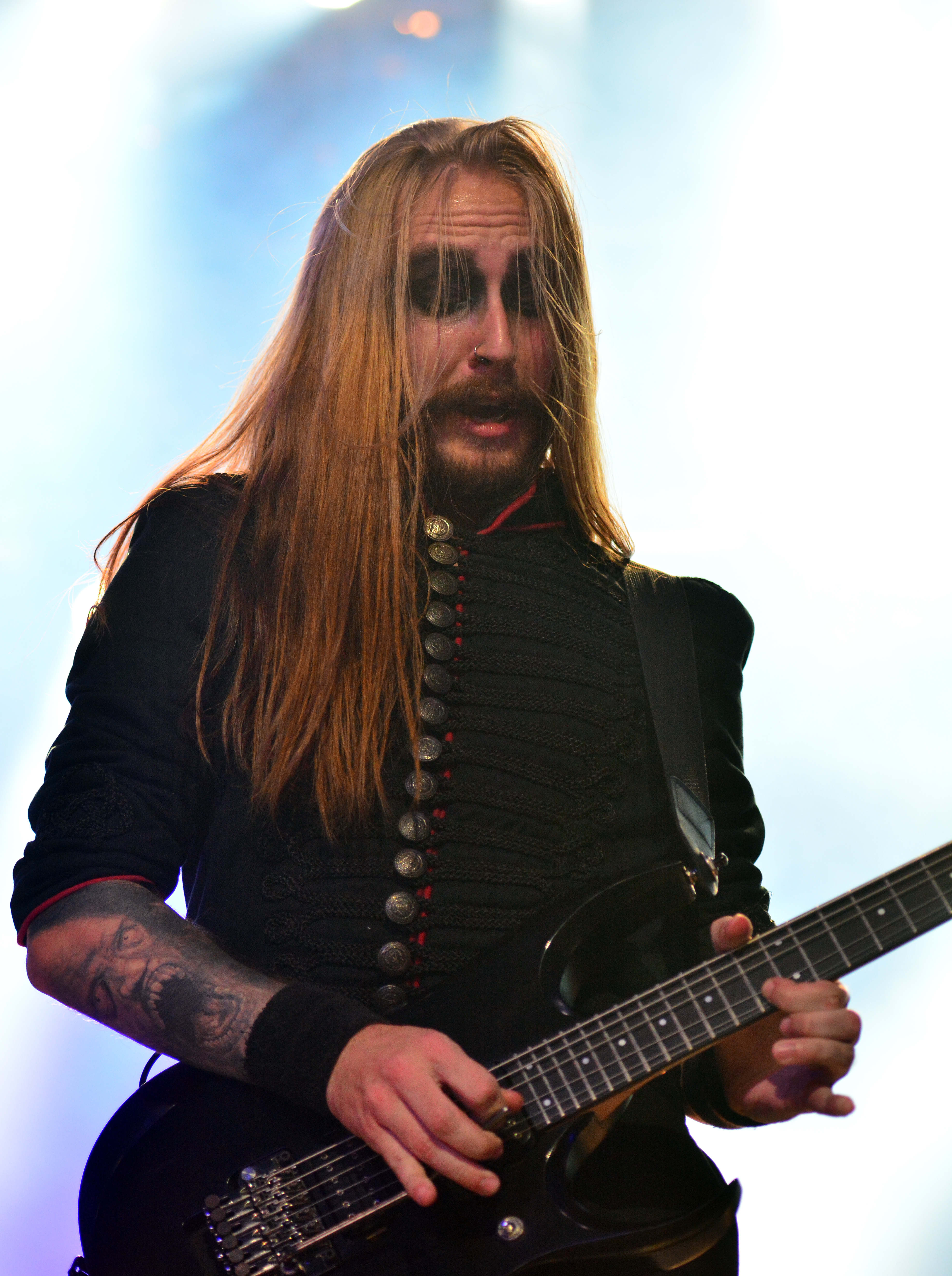 Avatar beim Wacken Open Air 2015